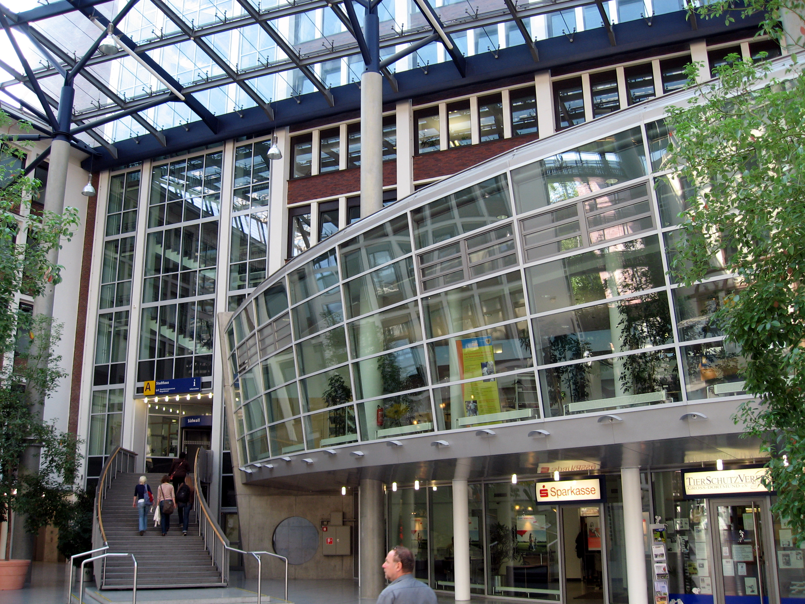 Dortmund, Stadtverwaltung, Berswordthalle, Aufgang zum Bürgerzentrum